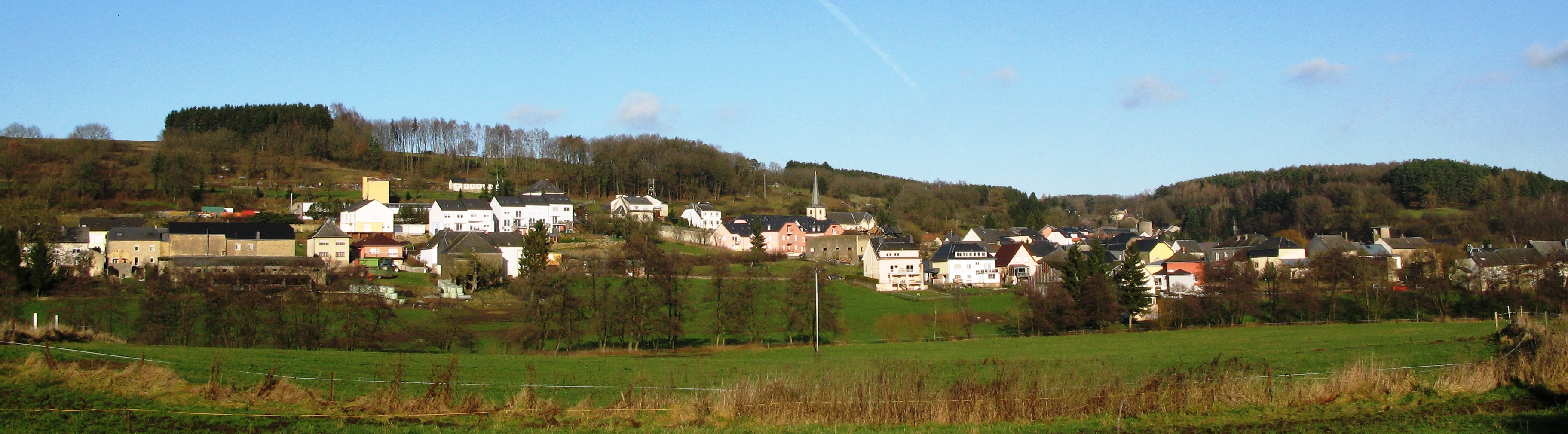 Le village luxembourgeois de Hobscheid